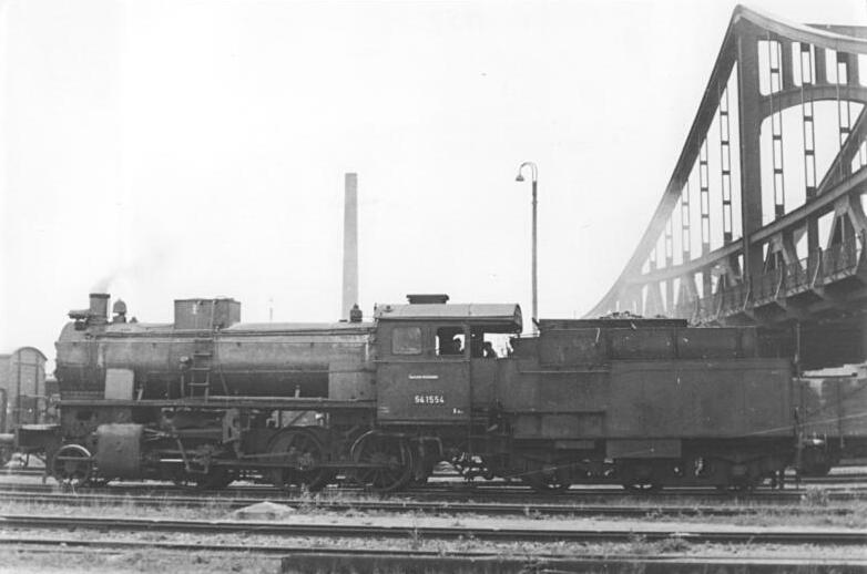 Dampflok 54 1554 (BR 54) Zentralbild Schmidtke 7.8.1952 Lokomotivtypen der Deutschen Reichsbahn. UBz: Baureihe 54